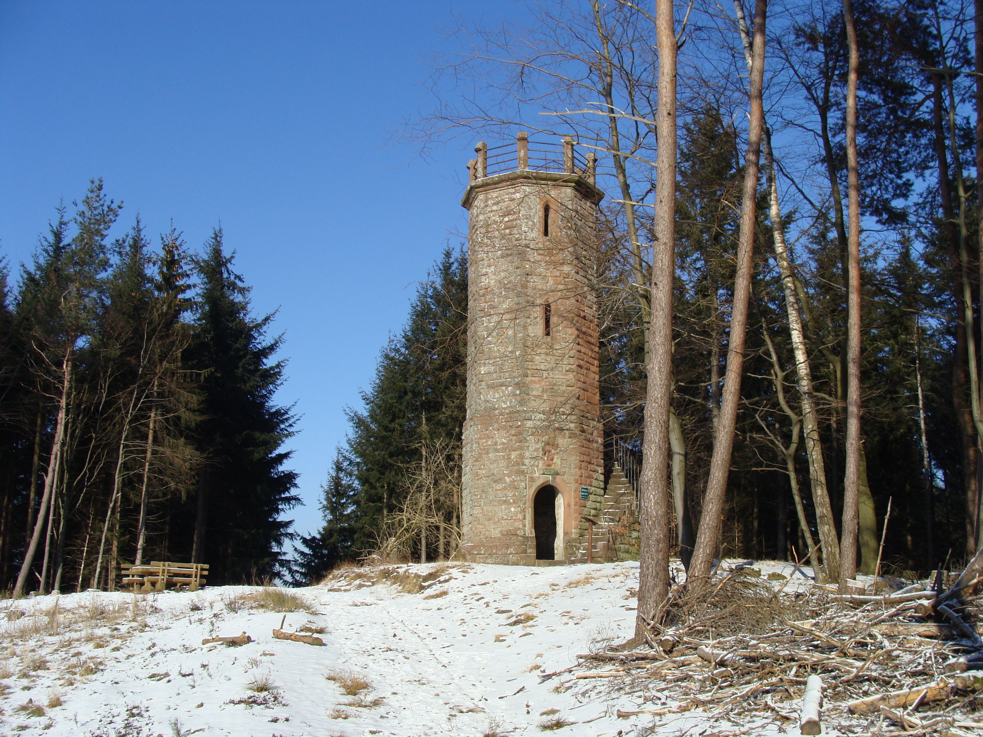 Steigerkopf mit Schänzelturm im Pfälzerwald